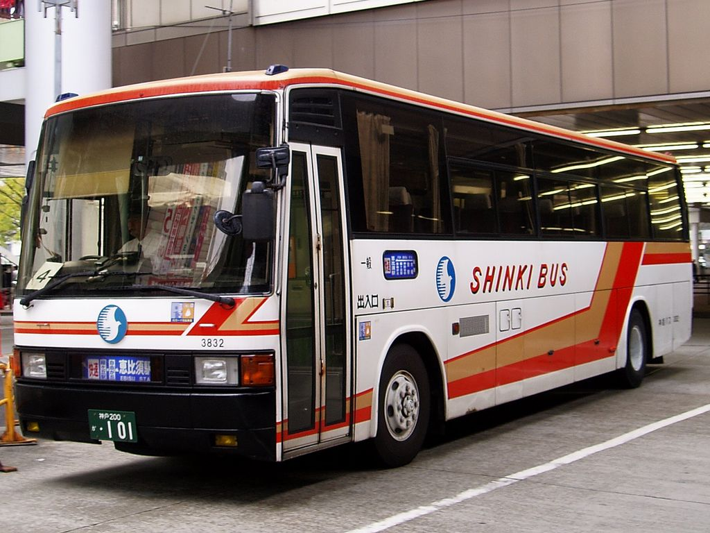 Shinki Bus 3832 Mitsubishi U-MS726S at Sannomiya Sta.